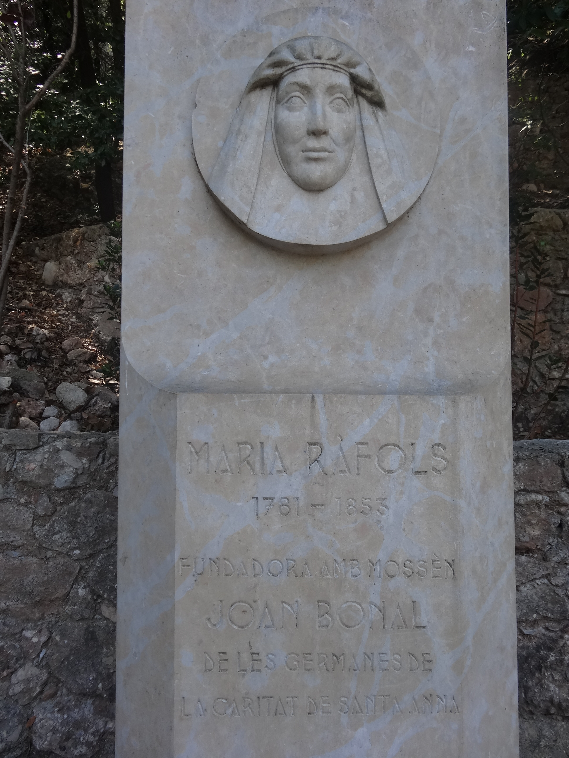 Escultures i monuments al camí de Sant Miquel, Montserrat. Maria Ràfols